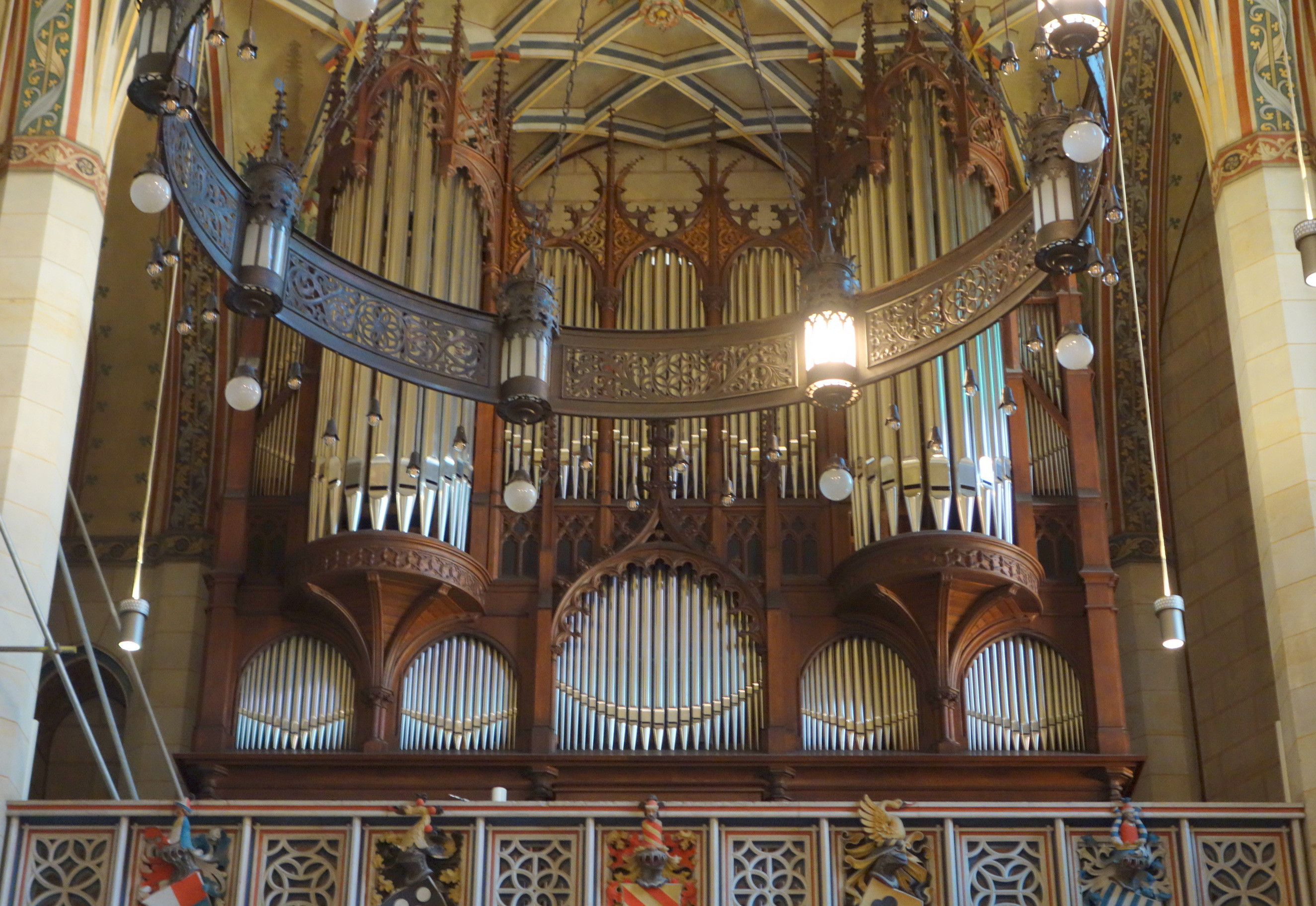 Orgel der Schlosskirche Wittenberg, Landkreis Wittenberg, Sachsen-Anhalt, Deutschland